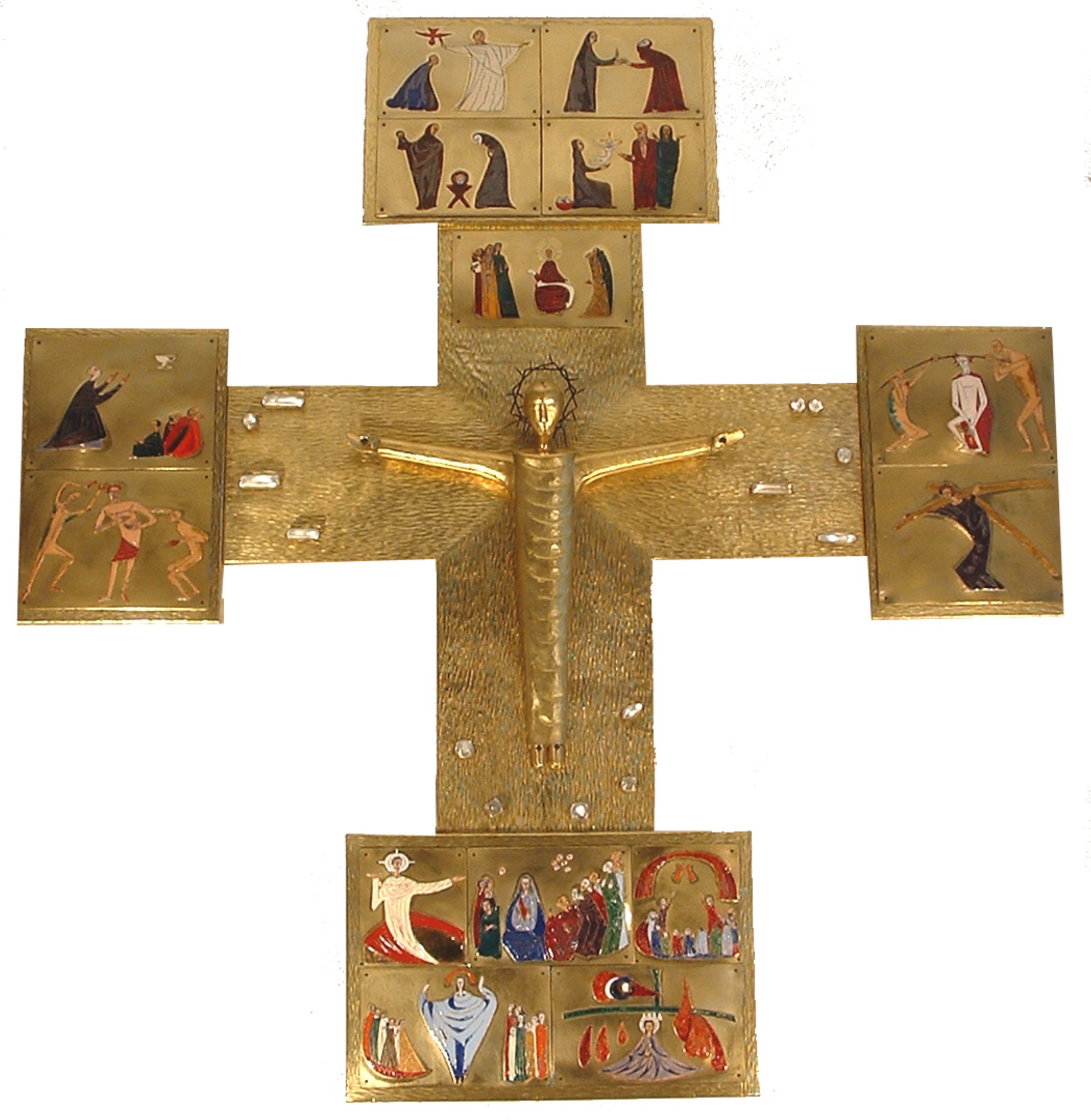 St. Peter und Paul Obernau - Rosenkranzkapelle Kreuz mit den Rosenkranzgeheimnissen